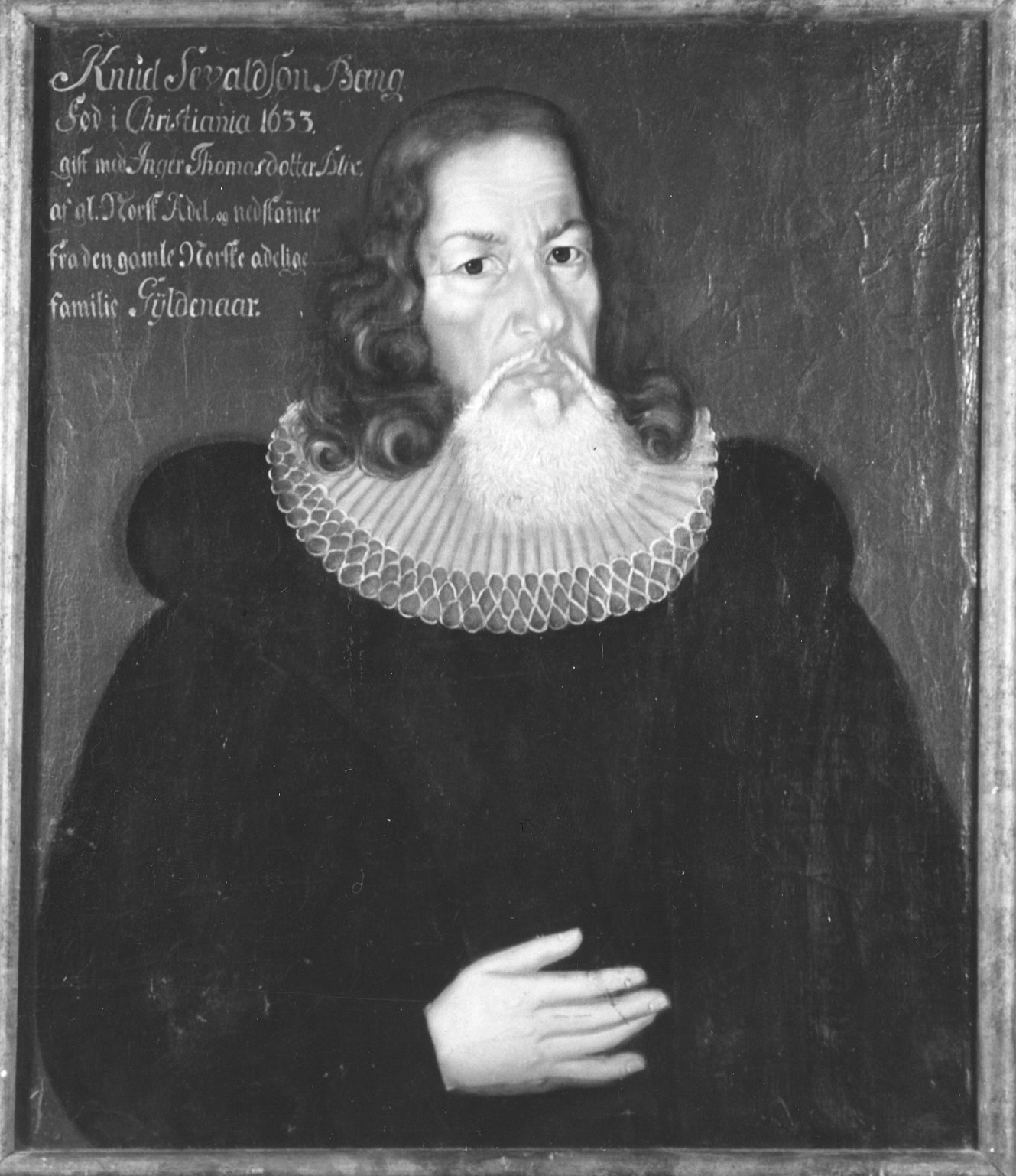 Oljemaleri forestillende sogneprest og forfatter Knud Sevaldsøn Bang (1633-1694)